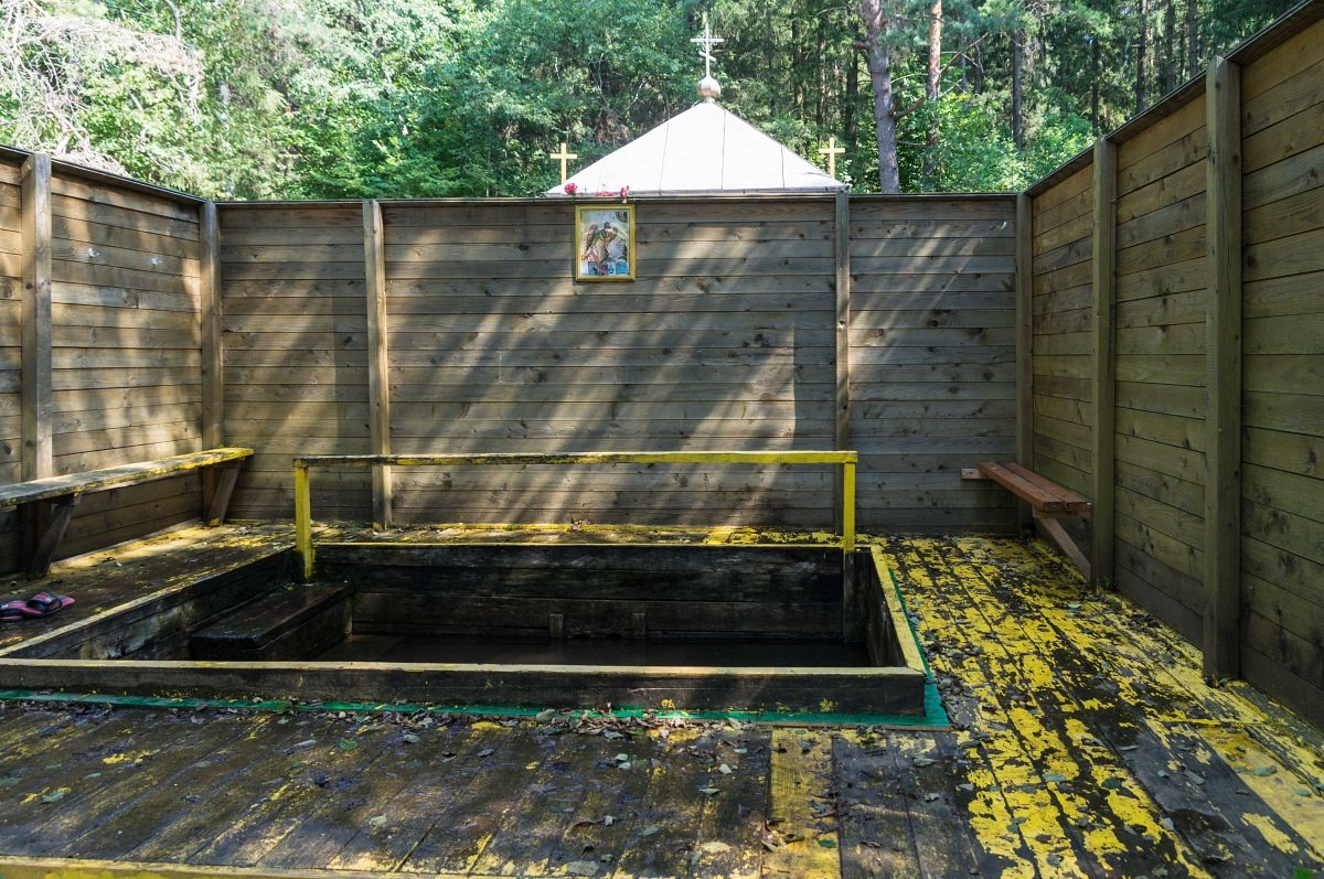 Чарневічы. Крыніца Св. Іаана Хрысціцеля. Купель